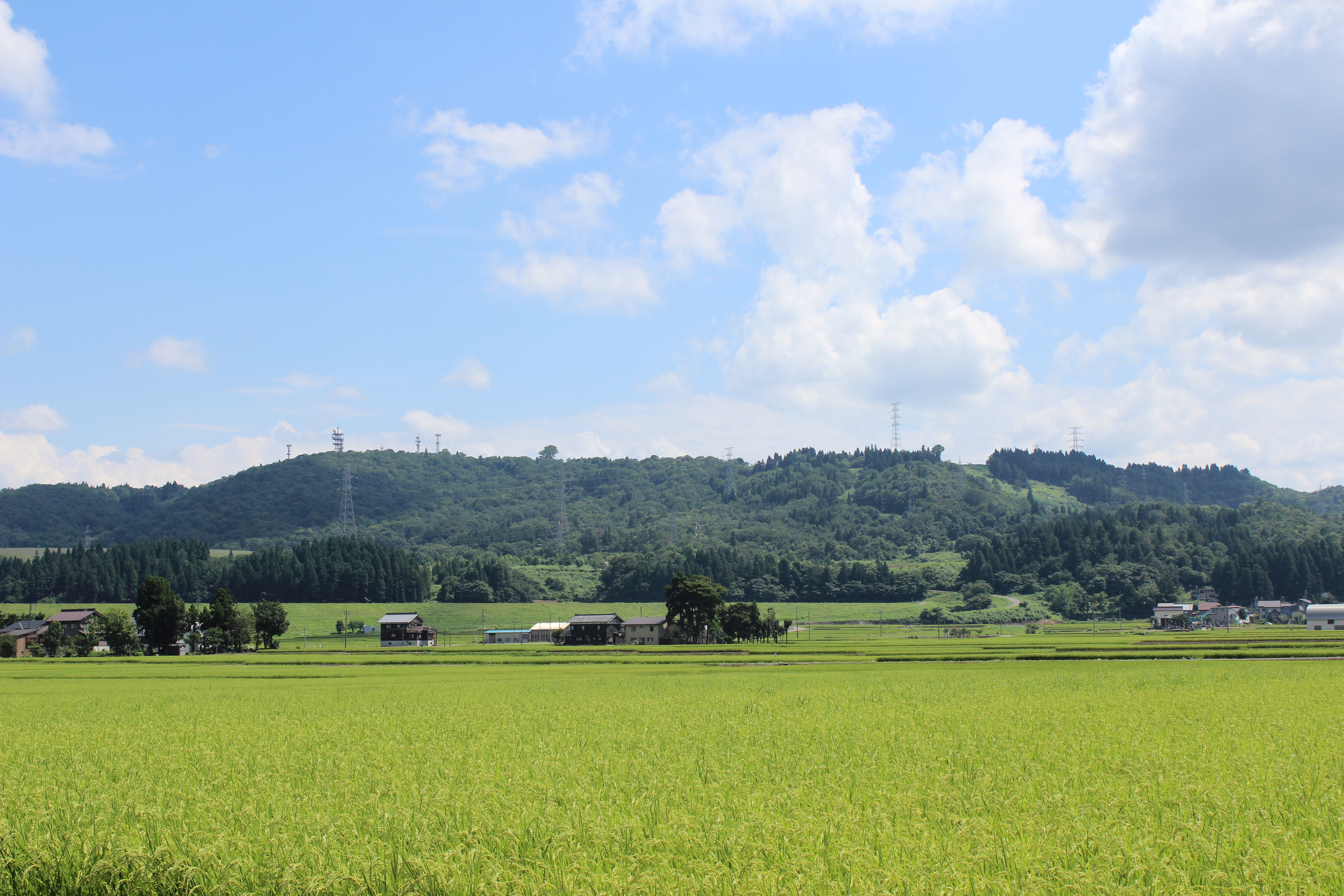 小千谷市郊外より望む山本山（左寄りの電波塔付近が山頂部）